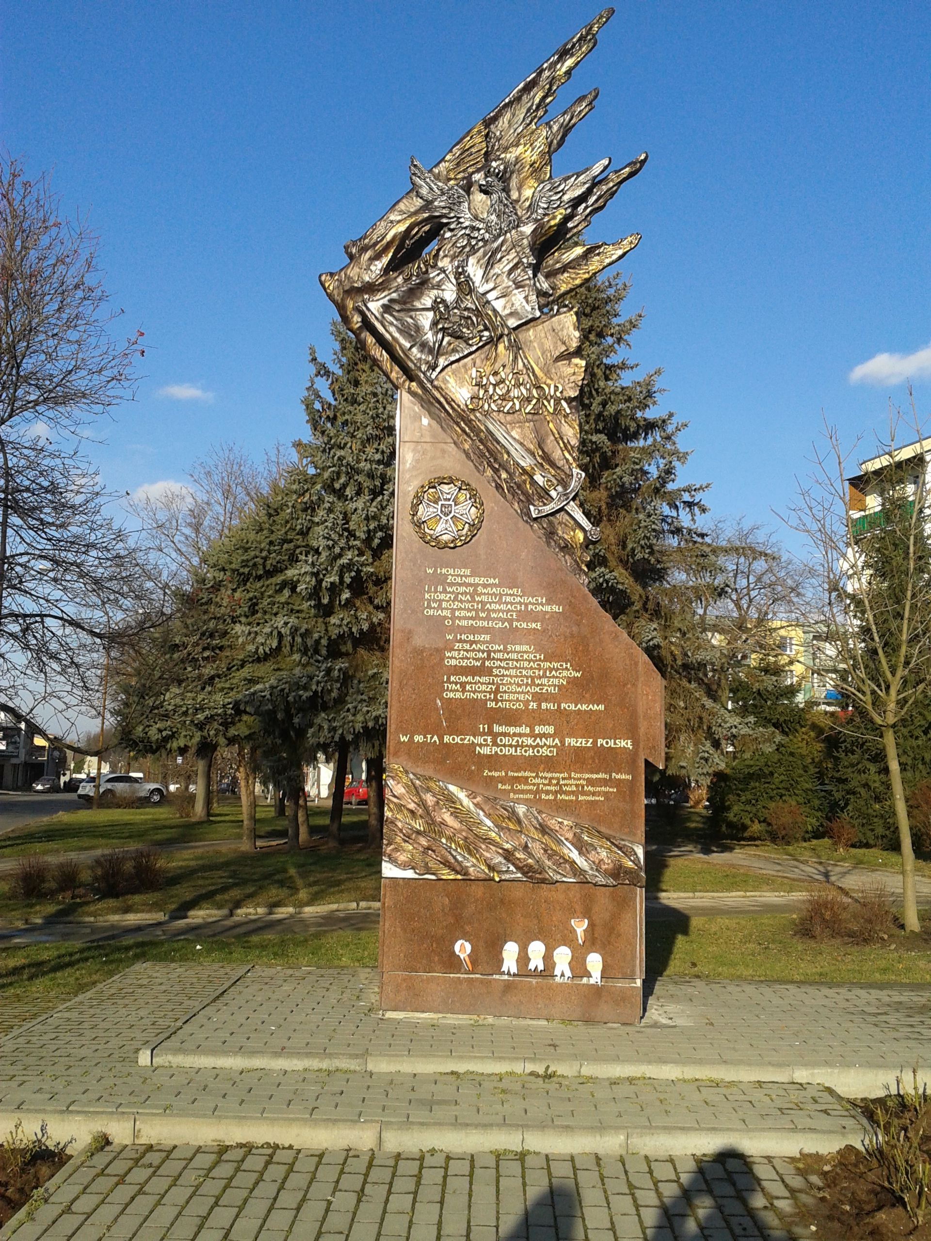 pomnik w hołdzie żołnierzom w 90 rocznicę odzyskania przez Polskę niepodległości róg ulicy Konfederackiej i Jana Pawła II w Jarosławiu